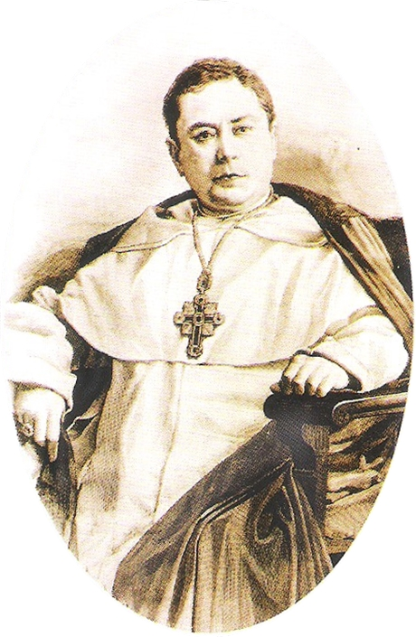 Retrato del cardenal don Zeferino González